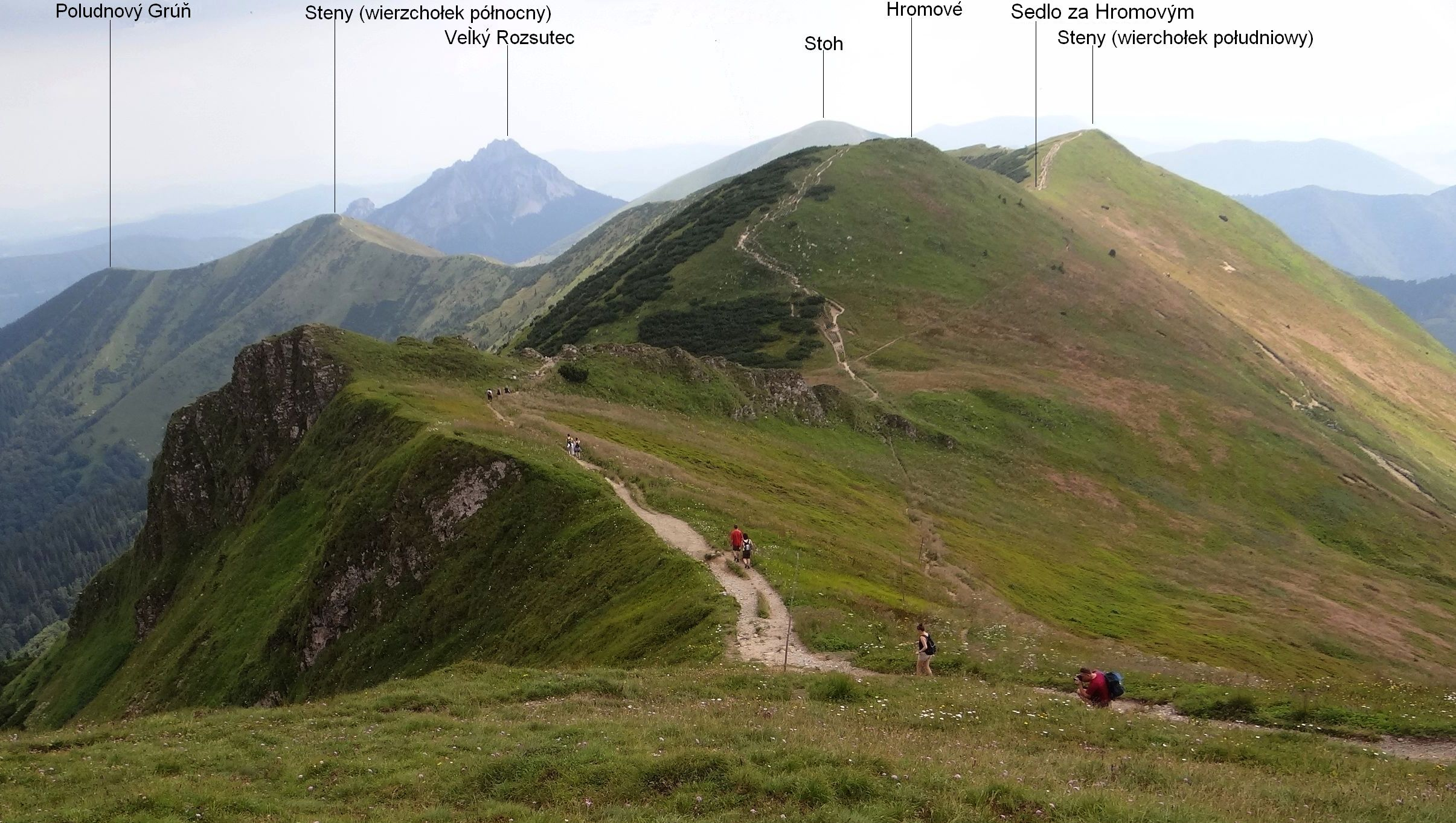 Hromové. Steny, widok z Chleba